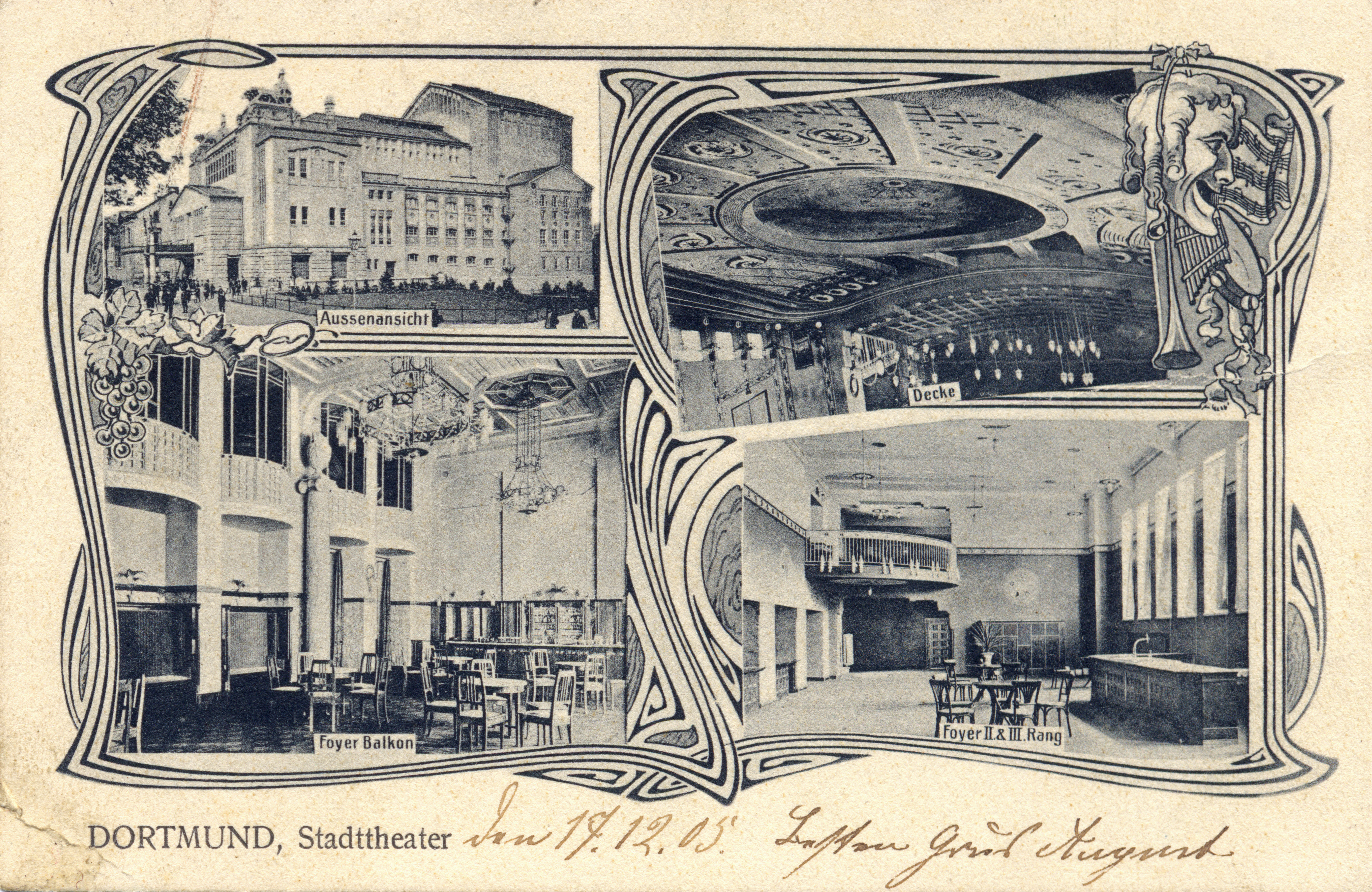 Stadttheater Dortmund; Ansichtskarte, gelaufen 1905; Verlag: Cramers Kunstanstalt, 1905, Nr. 10587